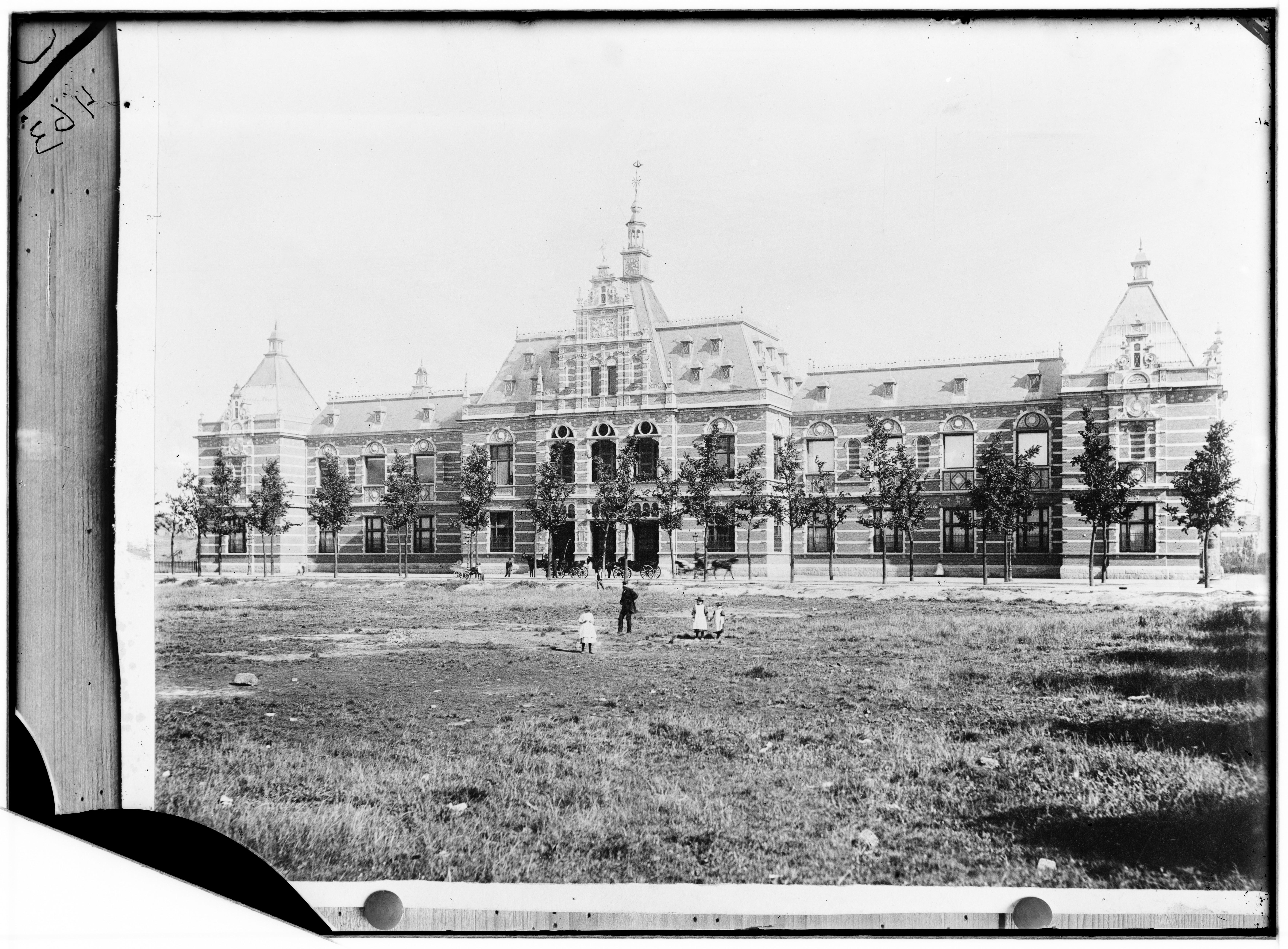 Beschrijving Exterieur van Museum Suasso - later het Stedelijk Museum - Paulus Potterstraat 13, ontworpen door architect A.W. Weissman Gezien vanuit de Van Baerlestraat, over het terrein waarop tussen 1899-1901 de Rijkspostspaarbank naar ontwerp van architect D.E.C. Knuttel verrees. Fotografische reproductie naar een historische opname uit ca. 1895-1899. Documenttype foto Vervaardiger Gebroeders Douwes (uitgever) Collectie Collectie Kunsthandel Gebr. Douwes: glasnegatieven Datering 1895 t/m 1899 Geografische naam Paulus Potterstraat Van Baerlestraat Inventarissen Afbeeldingsbestand B00000031386 Generated with Dememorixer